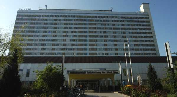 Krankenhaus Rudolfstiftung - Vorderfront